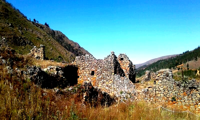 Monumento arqueológico de Incallajta This medium shows the protected monument with the number C/00-409 in Bolivia.